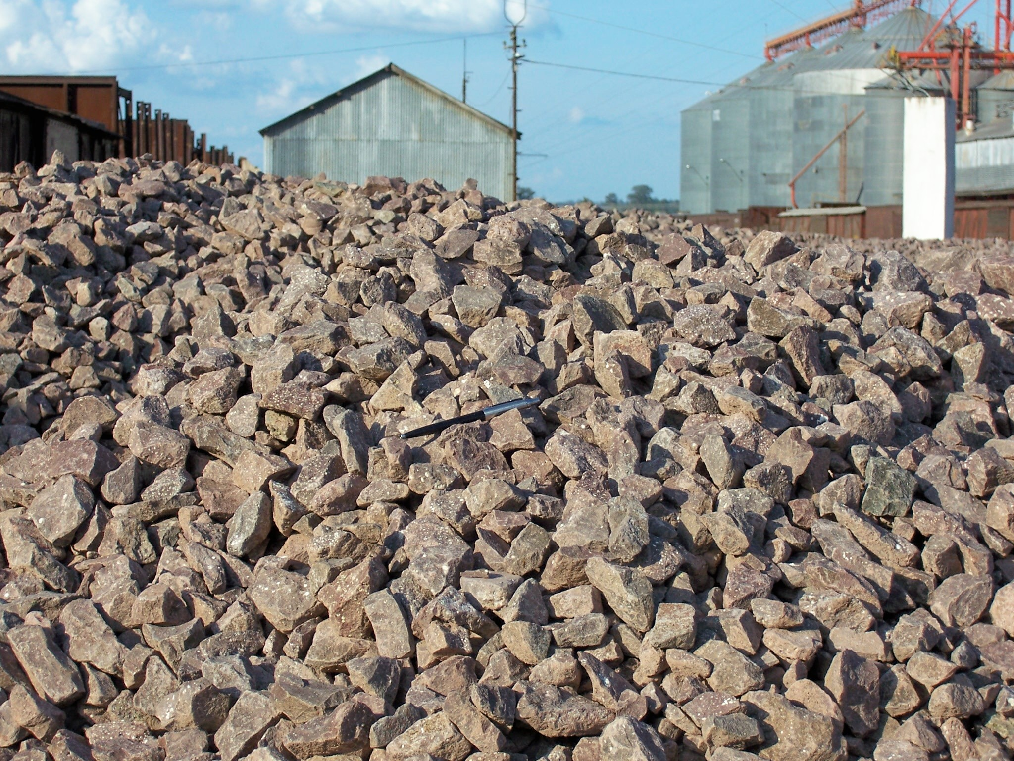 Balasto de vía obtenido por trituración de material basáltico procedente de la Cantera Batoví, Tacuarembó, Uruguay. Acopio en Estación Tacuarembó para obra de ANCAP en su ramal a Mina Vichadero, Paysandú.